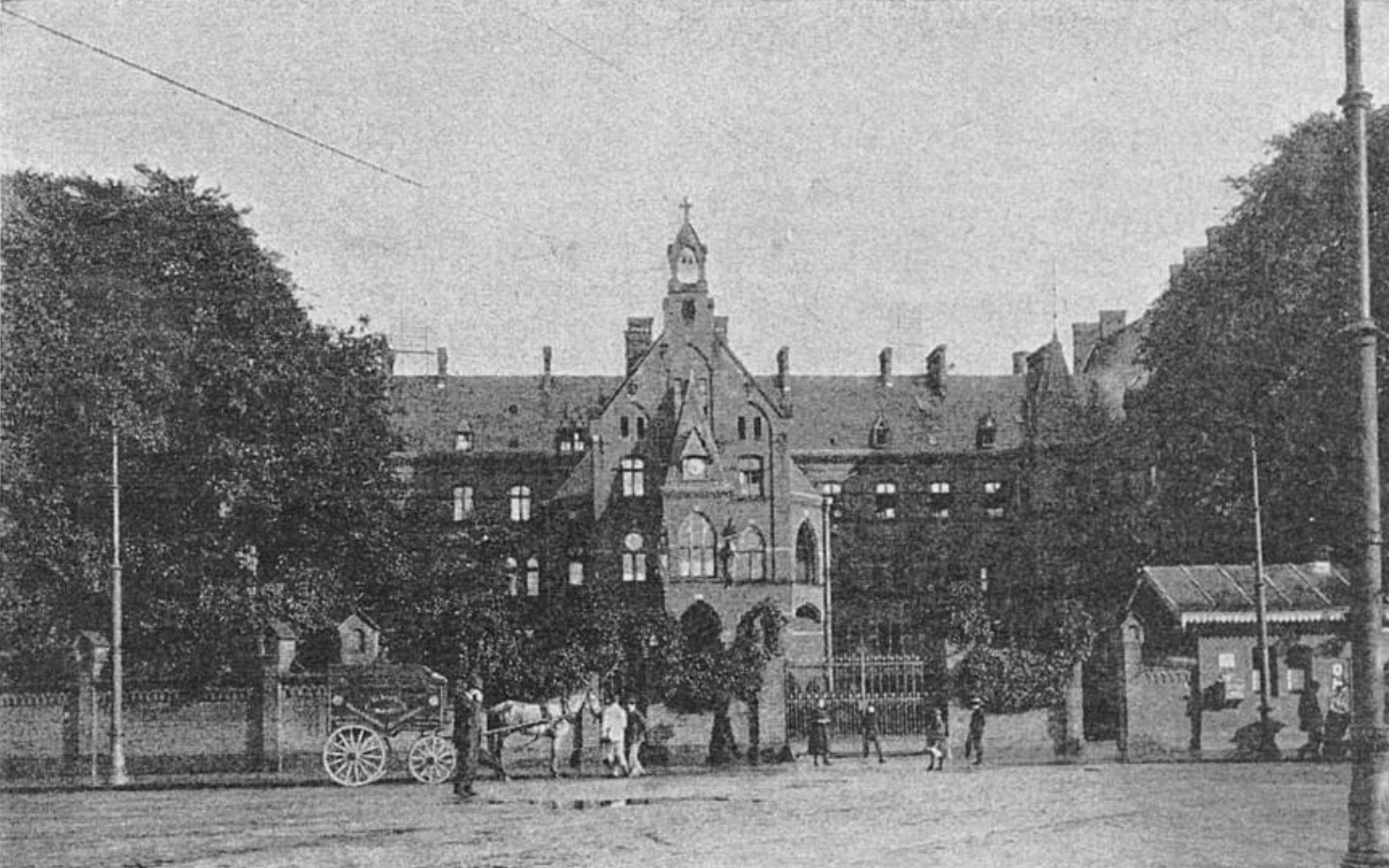 Marien Hospital zu Düsseldorf, 1902: Das Bild zeigt das Marienhospital Sternstraße 91 in Düsseldorf. Architekt war August Rincklake. „Es wurde in den Jahren 1867–1869 in gothischem Rohbaustile ausgeführt und liegt in einem 11 Morgen großen Garten. Das Hospital hat 350 Betten, die auf 24 Säle und 40 Zimmer verteilt sind. Seine ersten Kranken erhielt es am 15. August 1870; obgleich es damals im Inneren noch nicht ganz fertiggestellt war; es waren Verwundete aus dem deutsch-französischen Kriege, von denen im Ganzen ca. 800 dort verpflegt worden sind.“